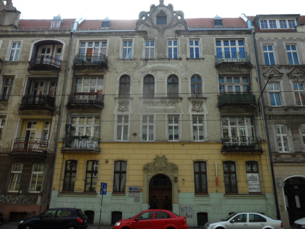 Schläsch: Brassel, Piastenstroaße 31